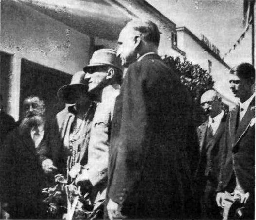 Kralj Aleksander I. Zedinitelj otvarj Ljubljanski velesejem.